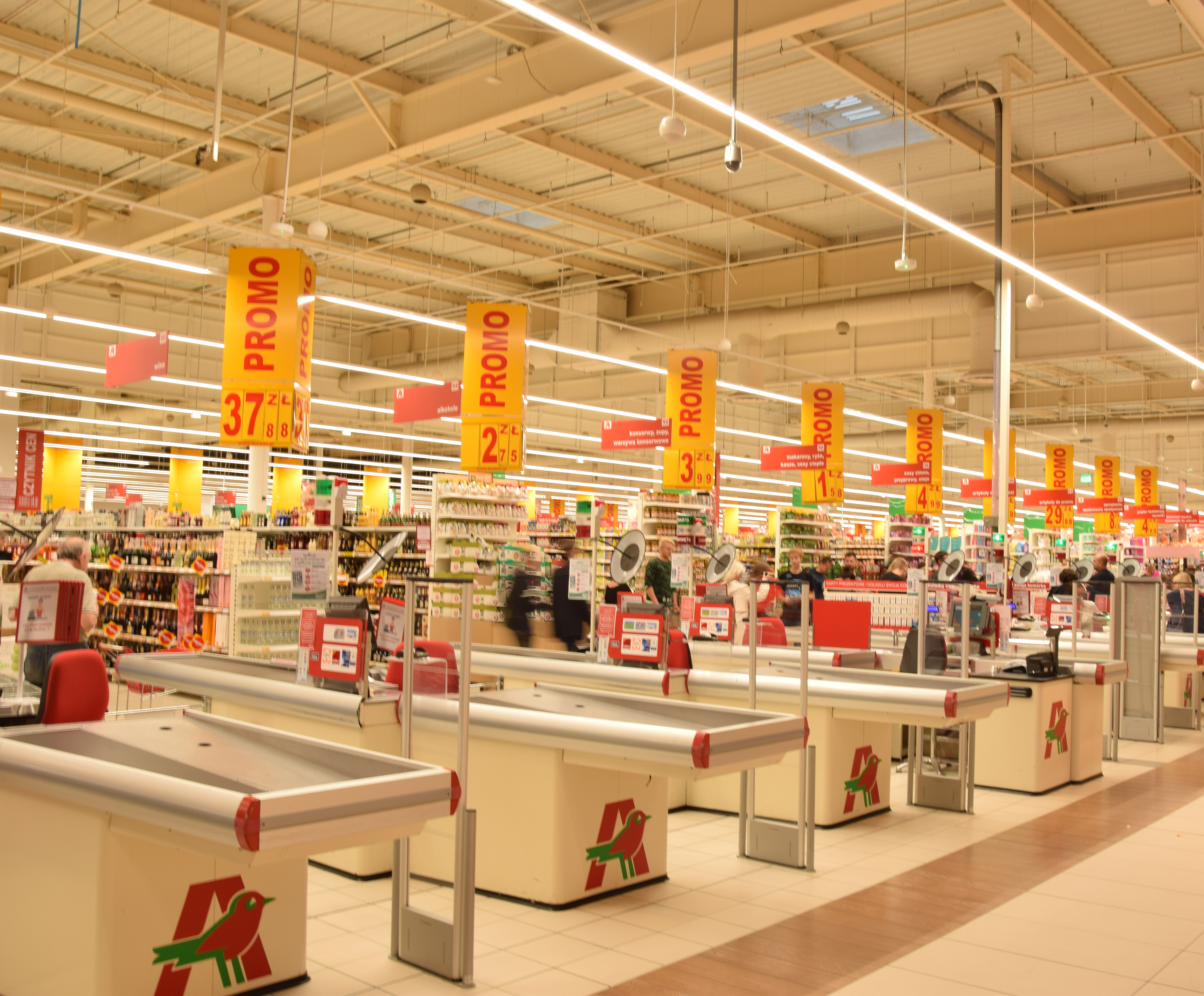 Hipermarket Auchan w Rivierze